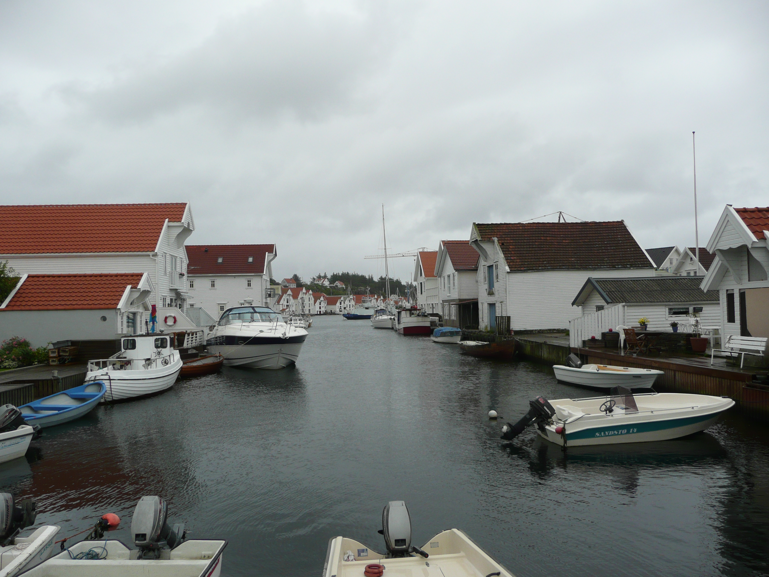 Skudeneshavn, Norway